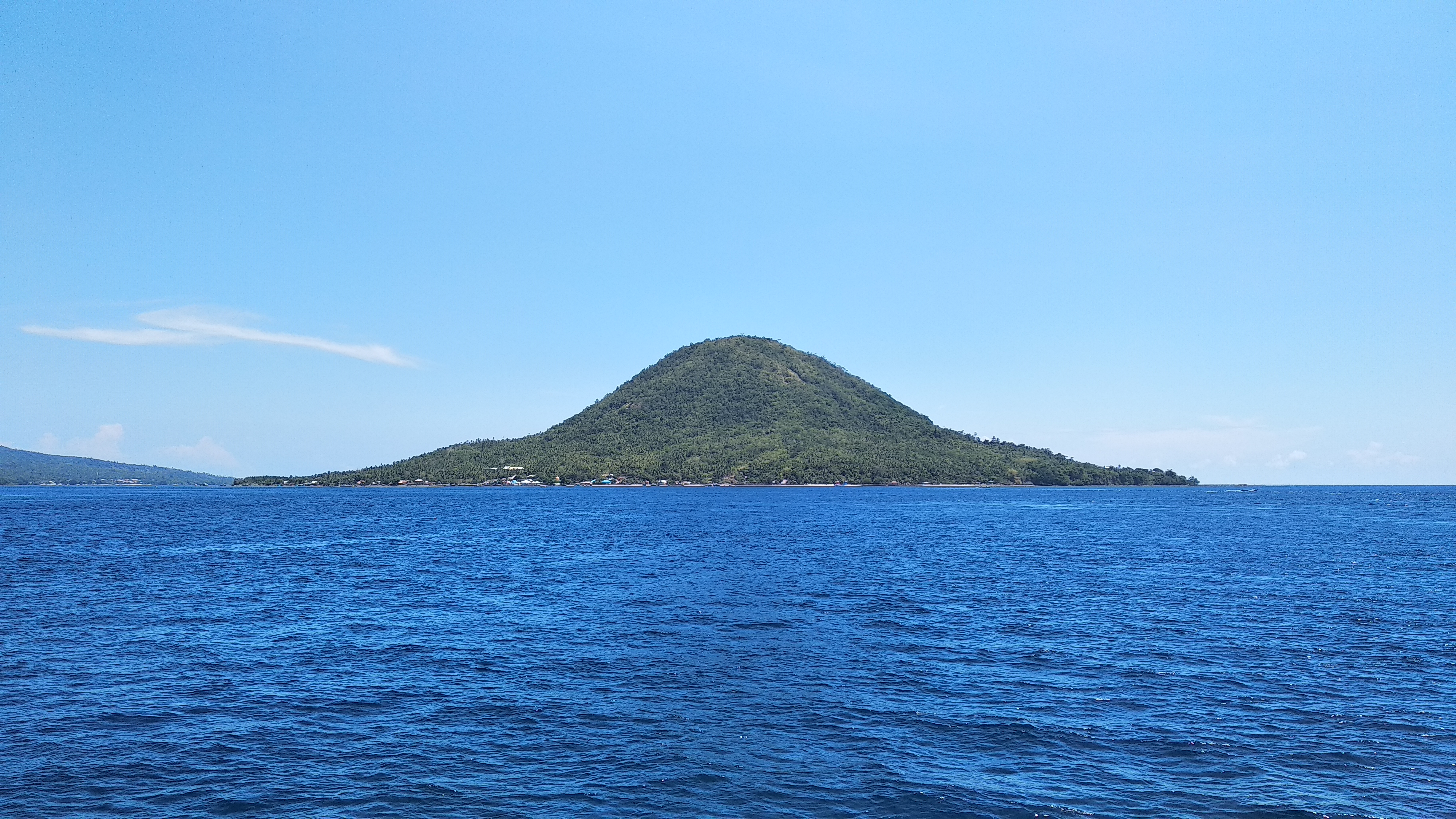 Pulau Maitara yang terletak di antara Pulau Tidore dan Pulau Ternate.